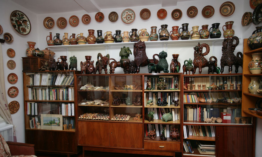 Інтер'єр